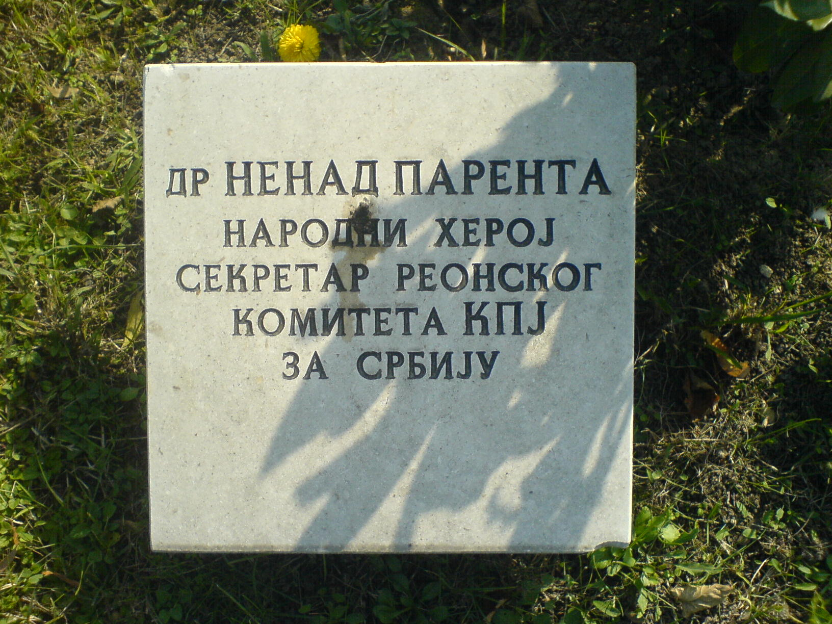 Grob Nenada Parente.